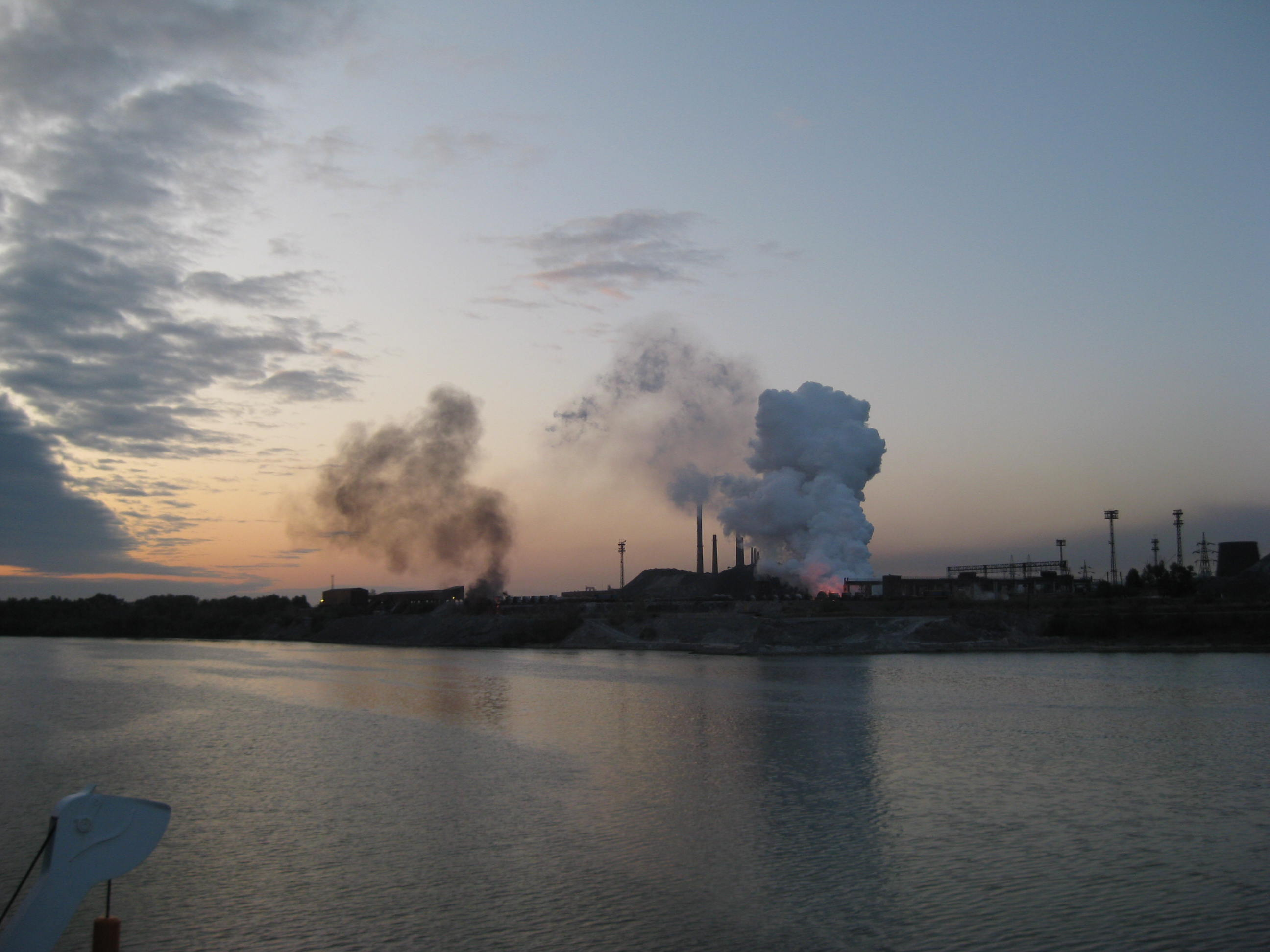 Staalfabriek (Zaporizhstal iron- and steel plant) aan de oever van de Dnjepr in Oekraïne